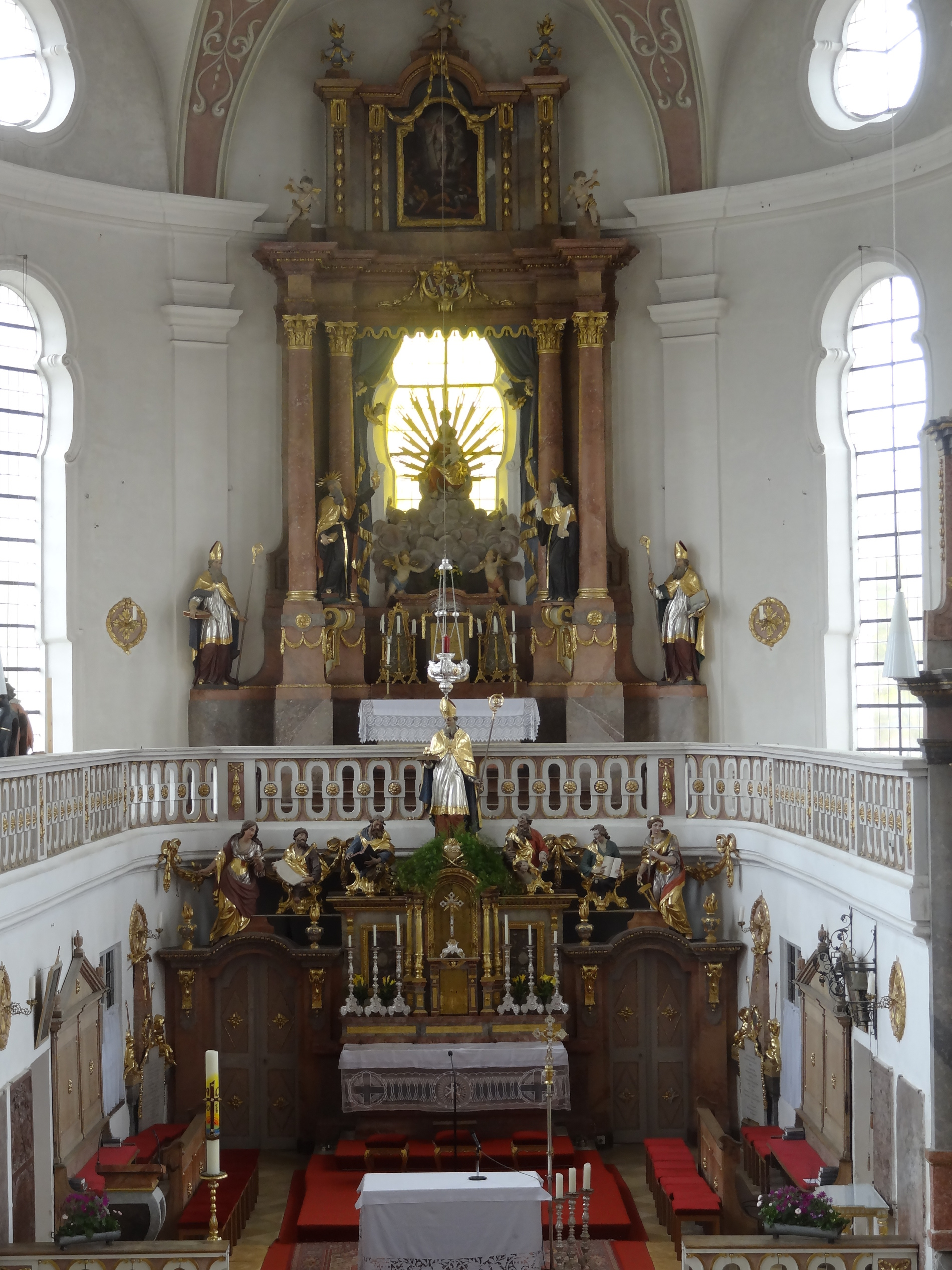 Altarraum der Pfarrkirche St. Nikolaus in Altfraunhofen (Lkr. Landshut)